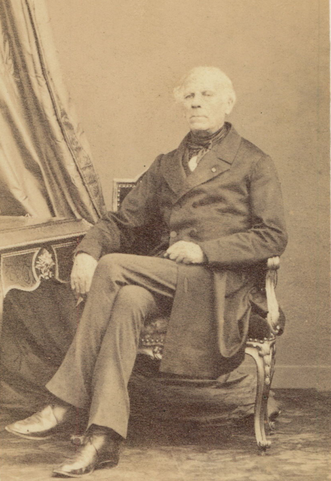 Raymond-Joseph-Paul, comte de Ségur d'Aguesseau